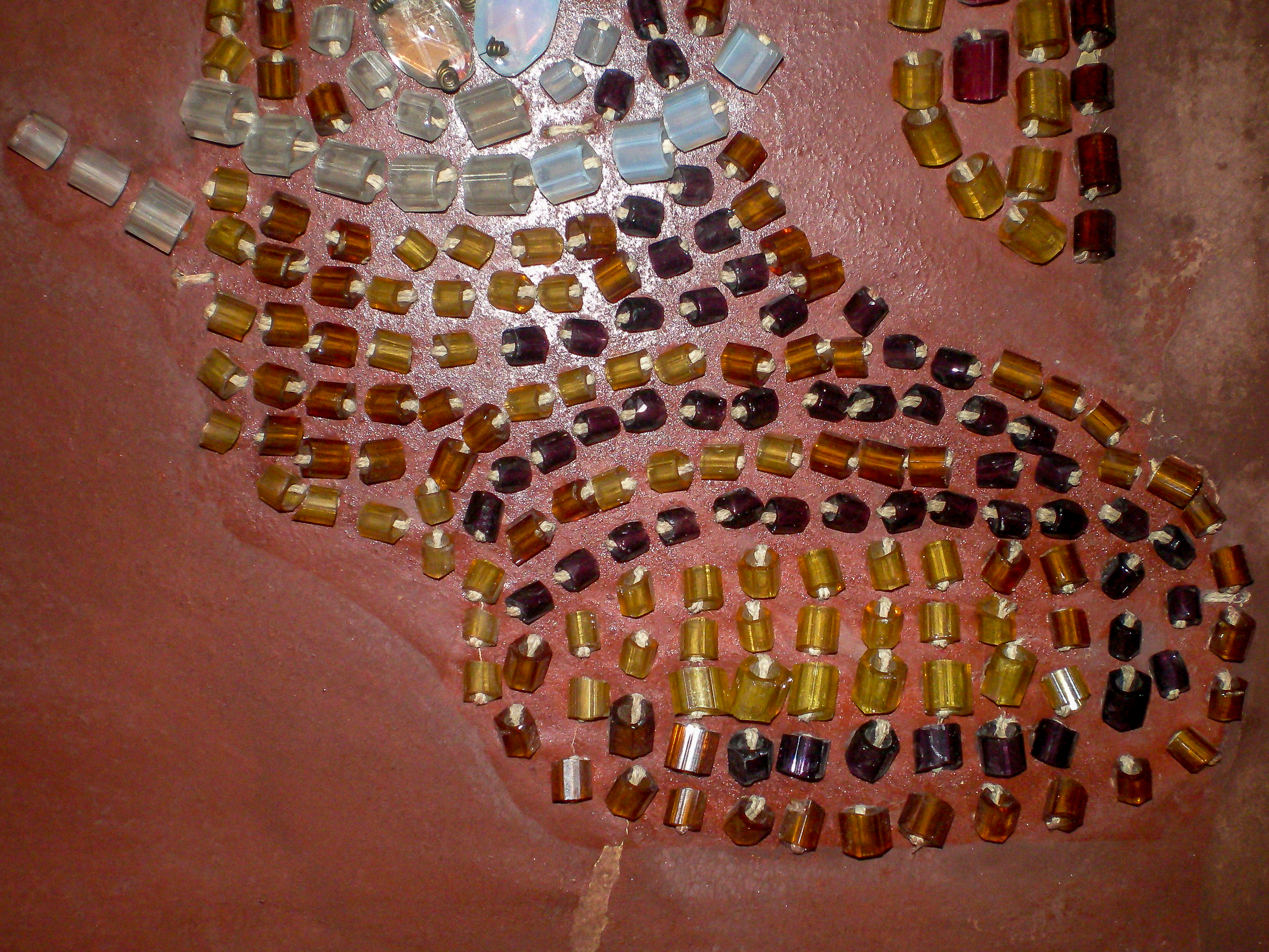 Detailaufnahme des linken Fußes des linken Wächters vom Heiligen Grab in Iffeldorf